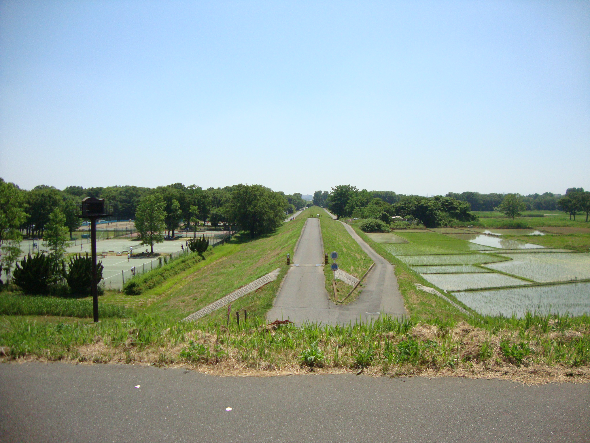 荒川左岸に築かれた横堤。さいたま市桜区にて撮影。